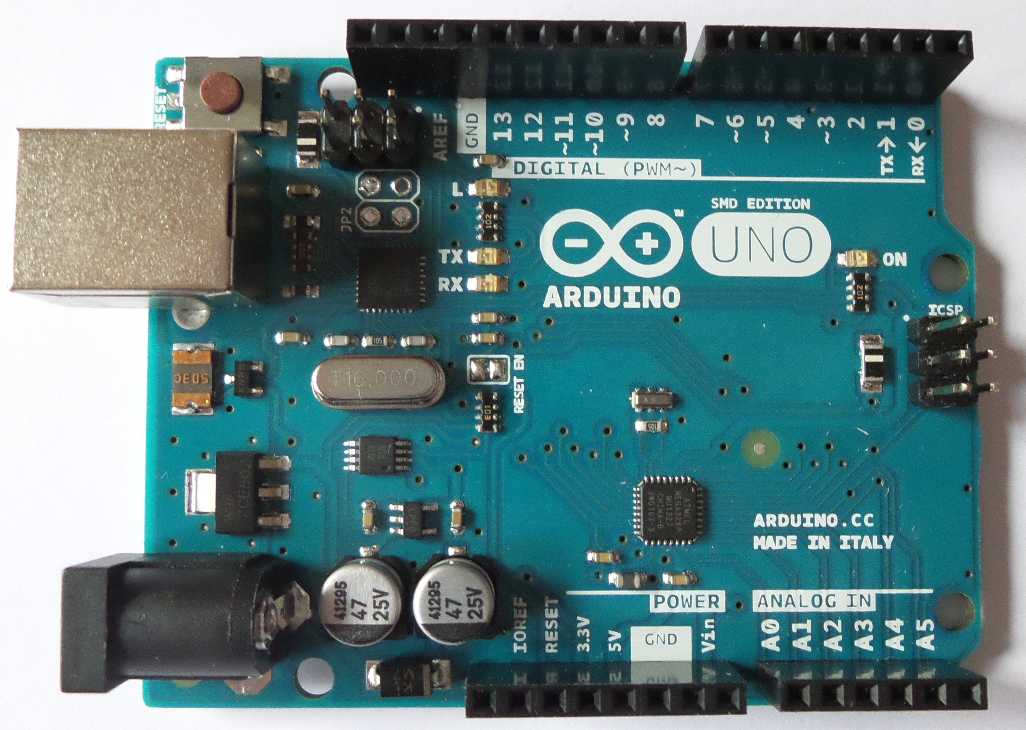 Arduino UNO R3 - aktuelle Version in SMD-Bauweise